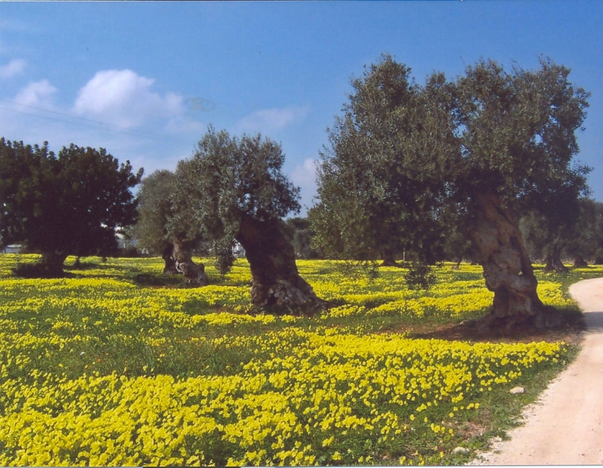 Ulivi fasanesi, primavera 2007